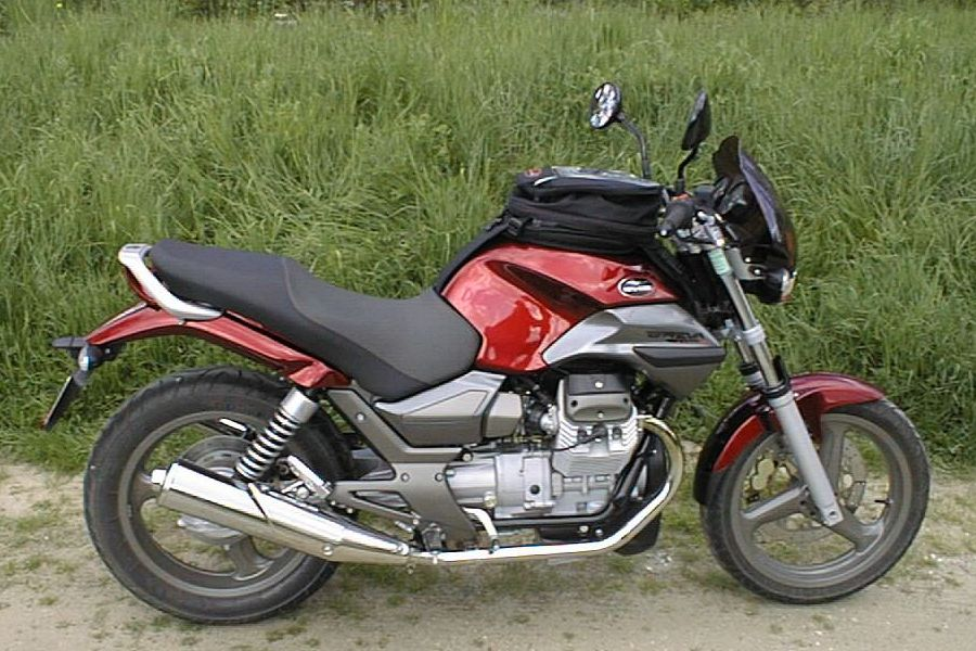 Moto Guzzi Breva 750ie de 2003 (avec sacoche de réservoir) ; coloris rouge